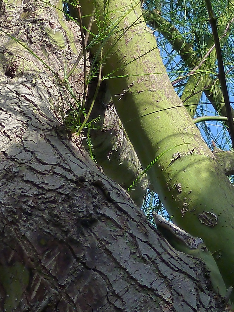 Parkinsonia aculeata : Tronco y ramas más jóvenes de coloración verde - Parque de la Huerta, Albatera (Alicante, España).